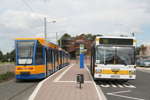 Knotenpunkt Knautkleeberg (Bahnhof Leipzig-Knauthain), 11 km from Leipzig, Deutschland (Zone 33).